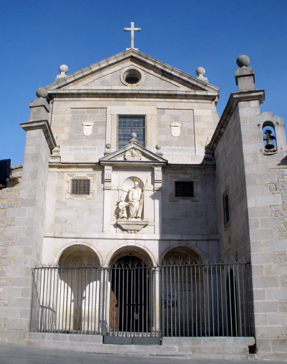 Convento de San José o de las Madres (Ávila)